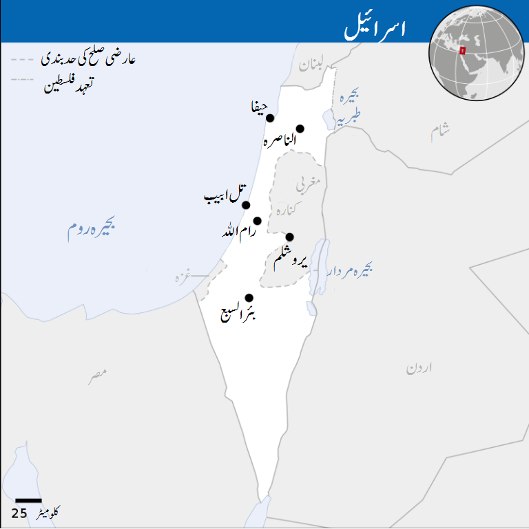 جدید ریاست اسرائیل ، ہدف صہیونی تحریک